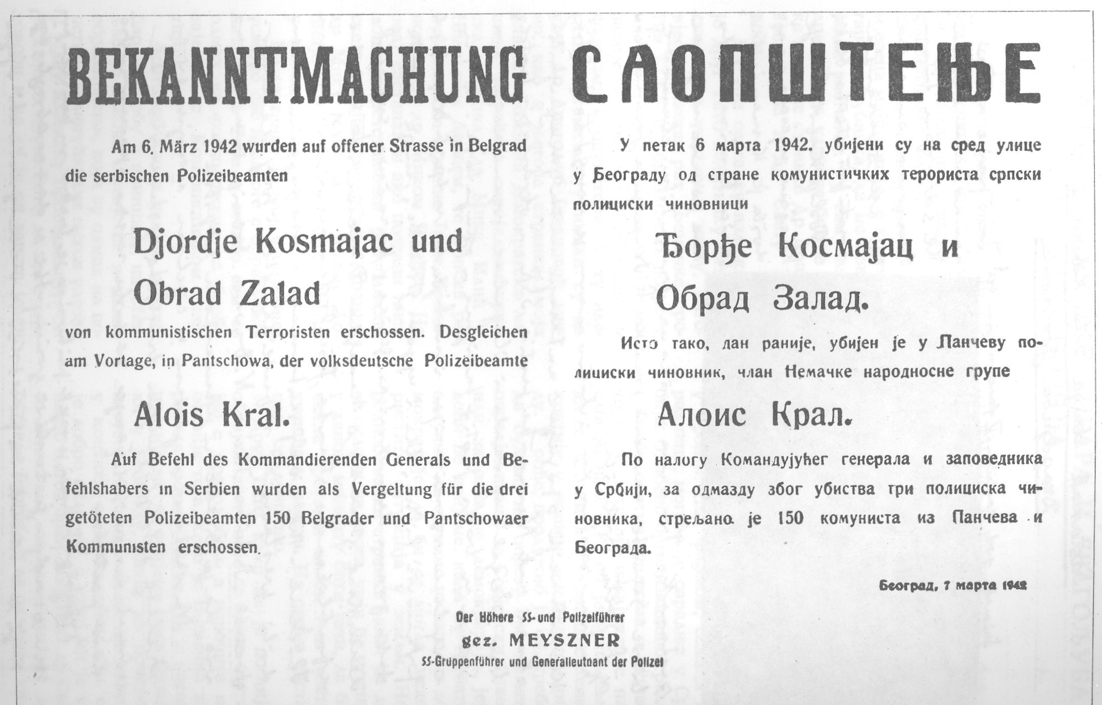 Srpski (latinica): Saopštenje o streljenju komunista u Beogradu u Pančevu 1942. godine.